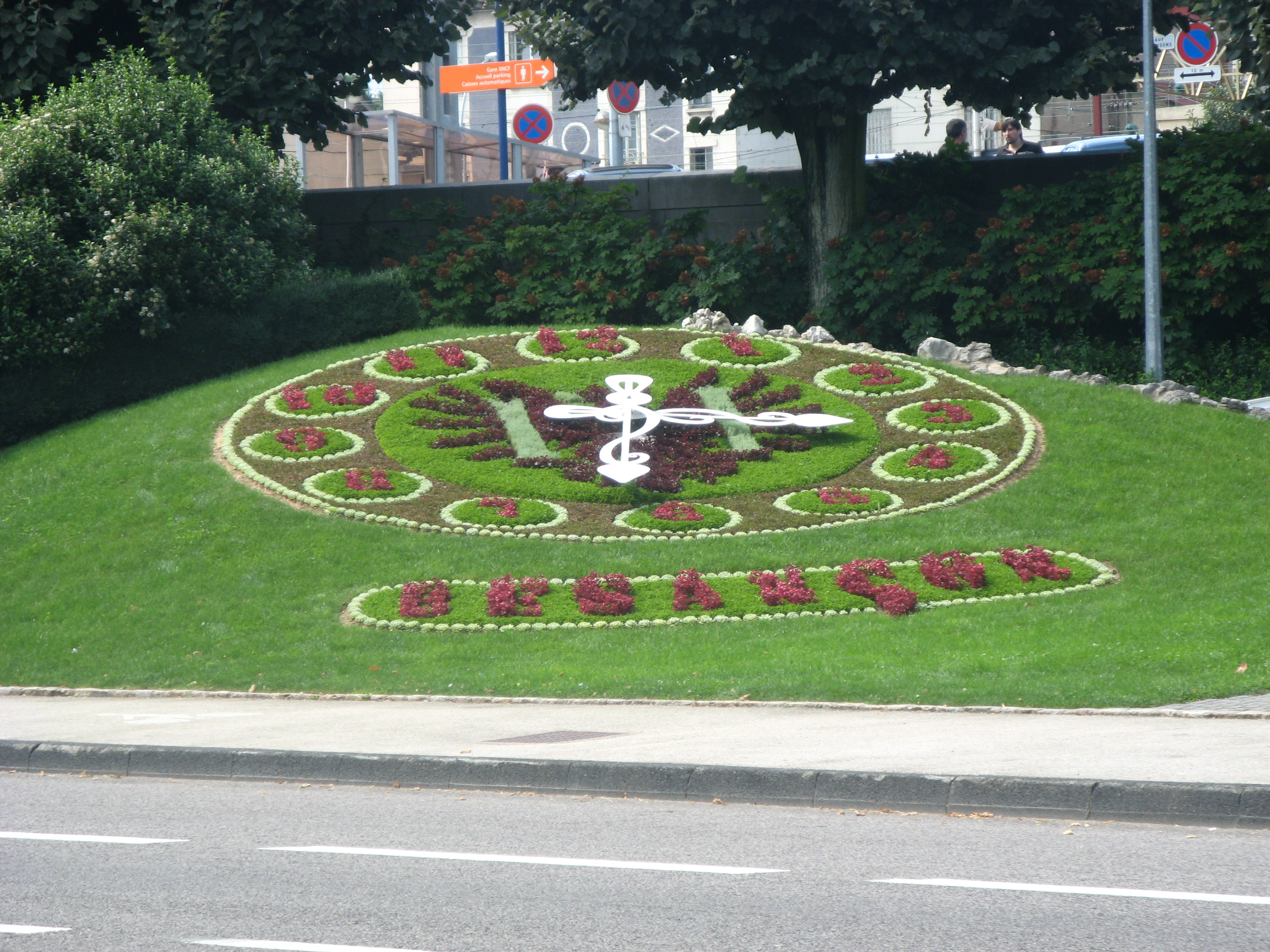 horloge gare viotte besancon